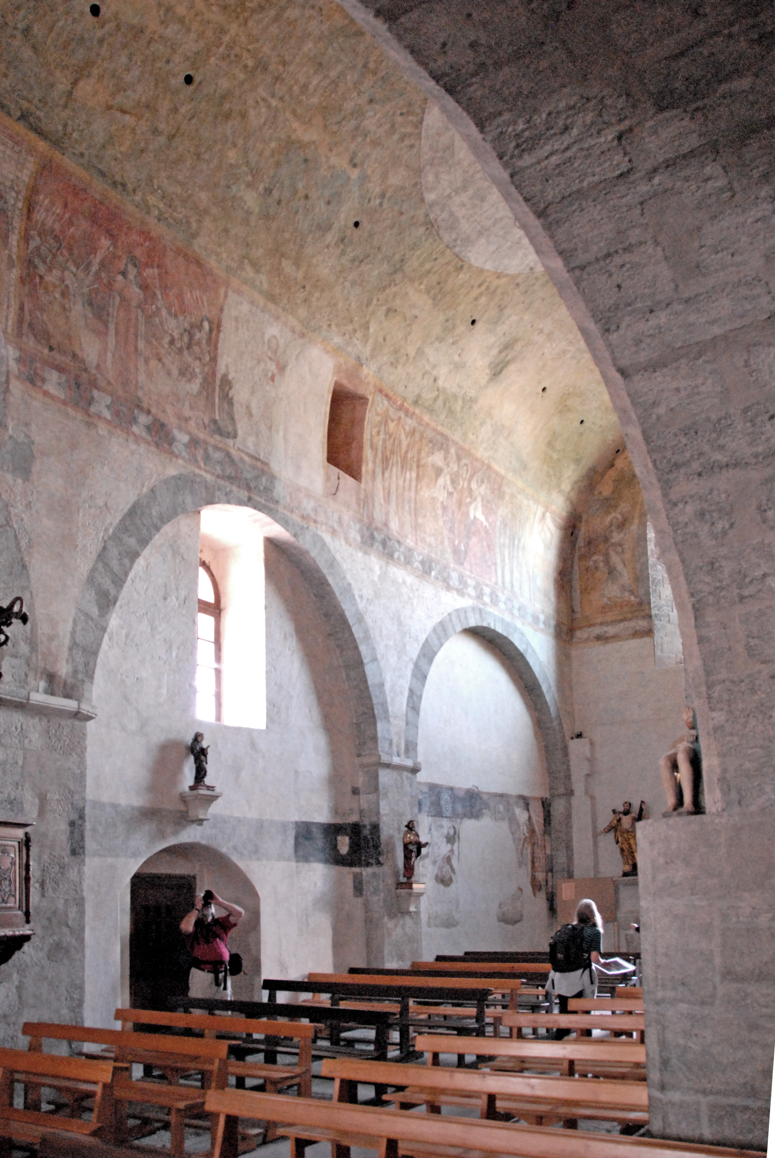 Abteikirche St.-André Lavaudieu, Hauptschiff Südwand, Joche 1 u. 2